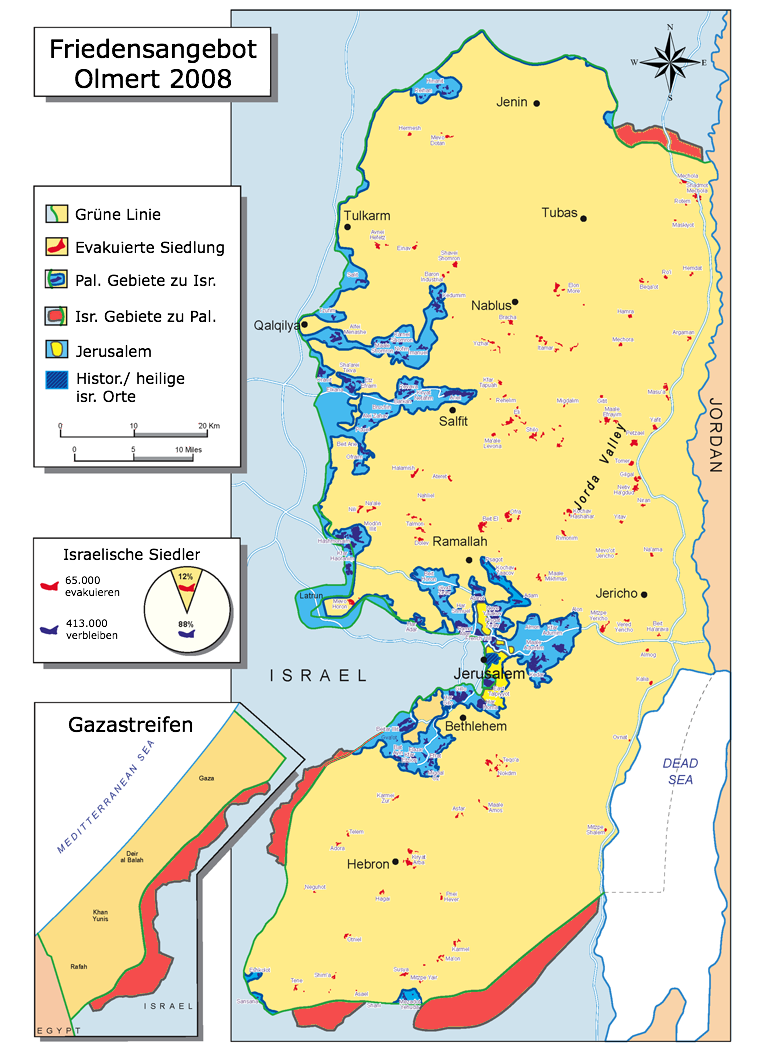 Der von Olmert in 2008 angebotene Friedensplan wurde von Mahmoud Abbas abgelehnt.